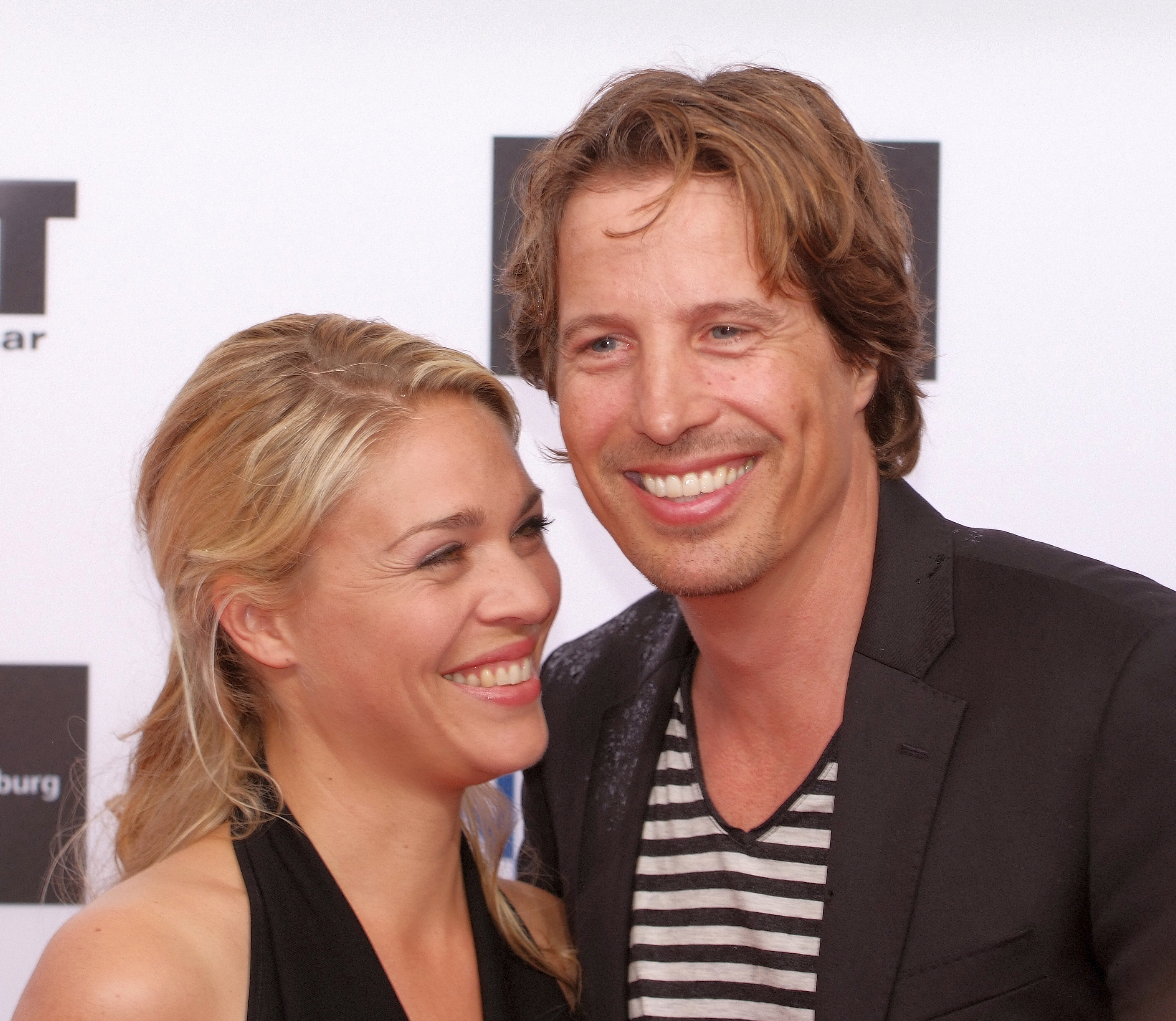 Studio Hamburg Nachwuchspreis 2012 Jelena Mitschke + Hakim-Michael Meziani